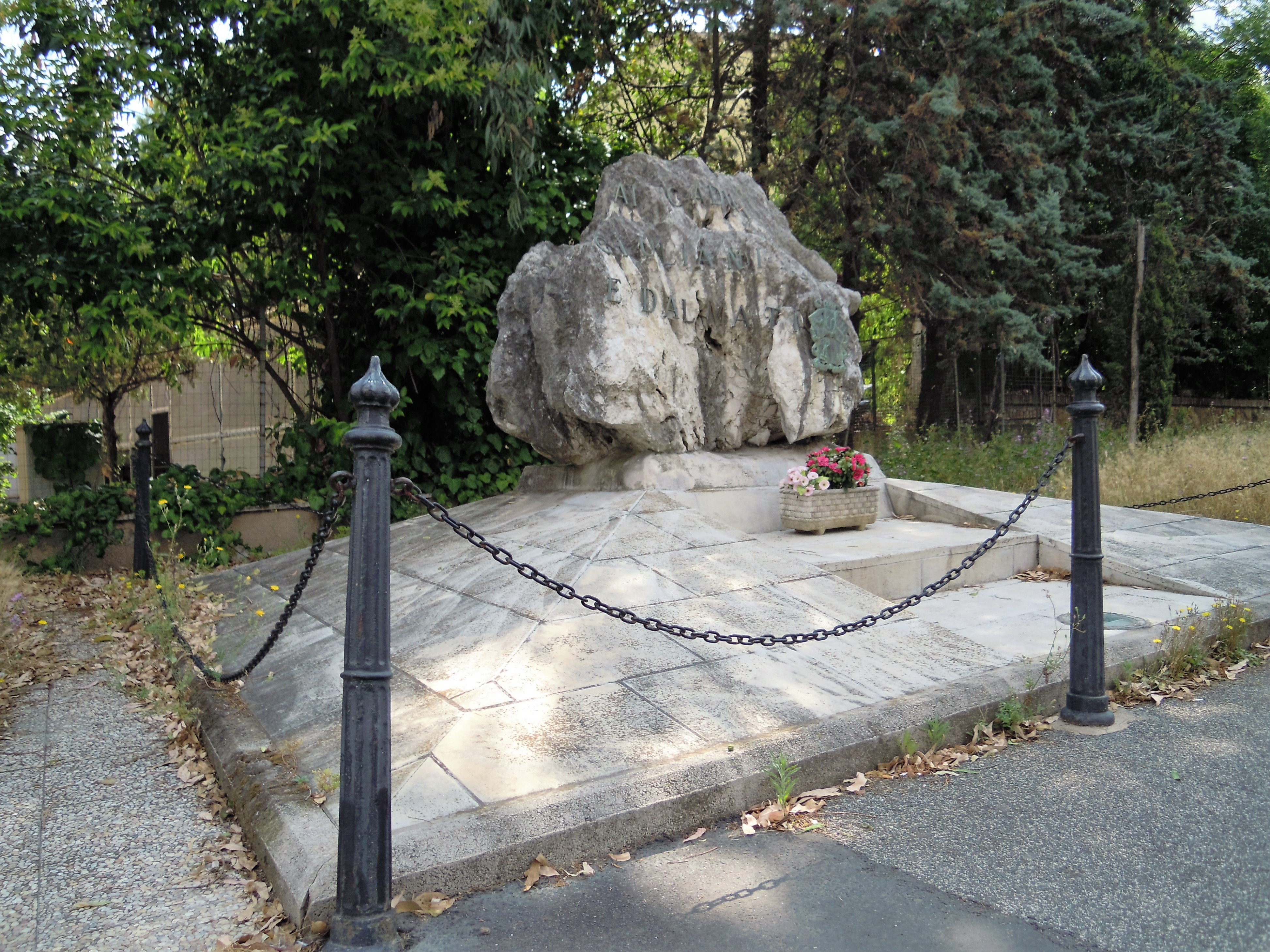 Roma, via Laurentina: monumento ai caduti giuliani e dalmati